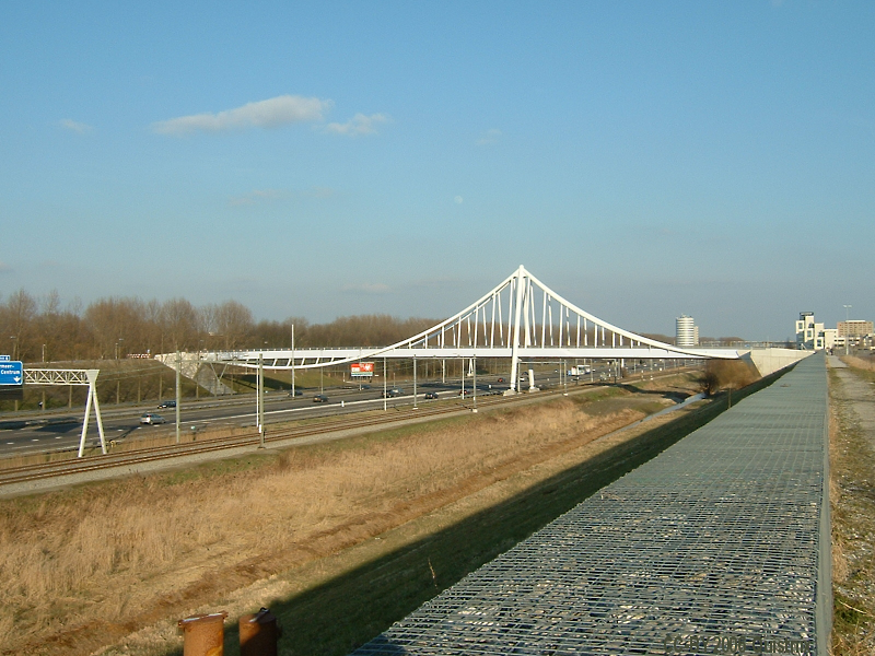 Fietsersbrug over de A12 bij Zoetermeer